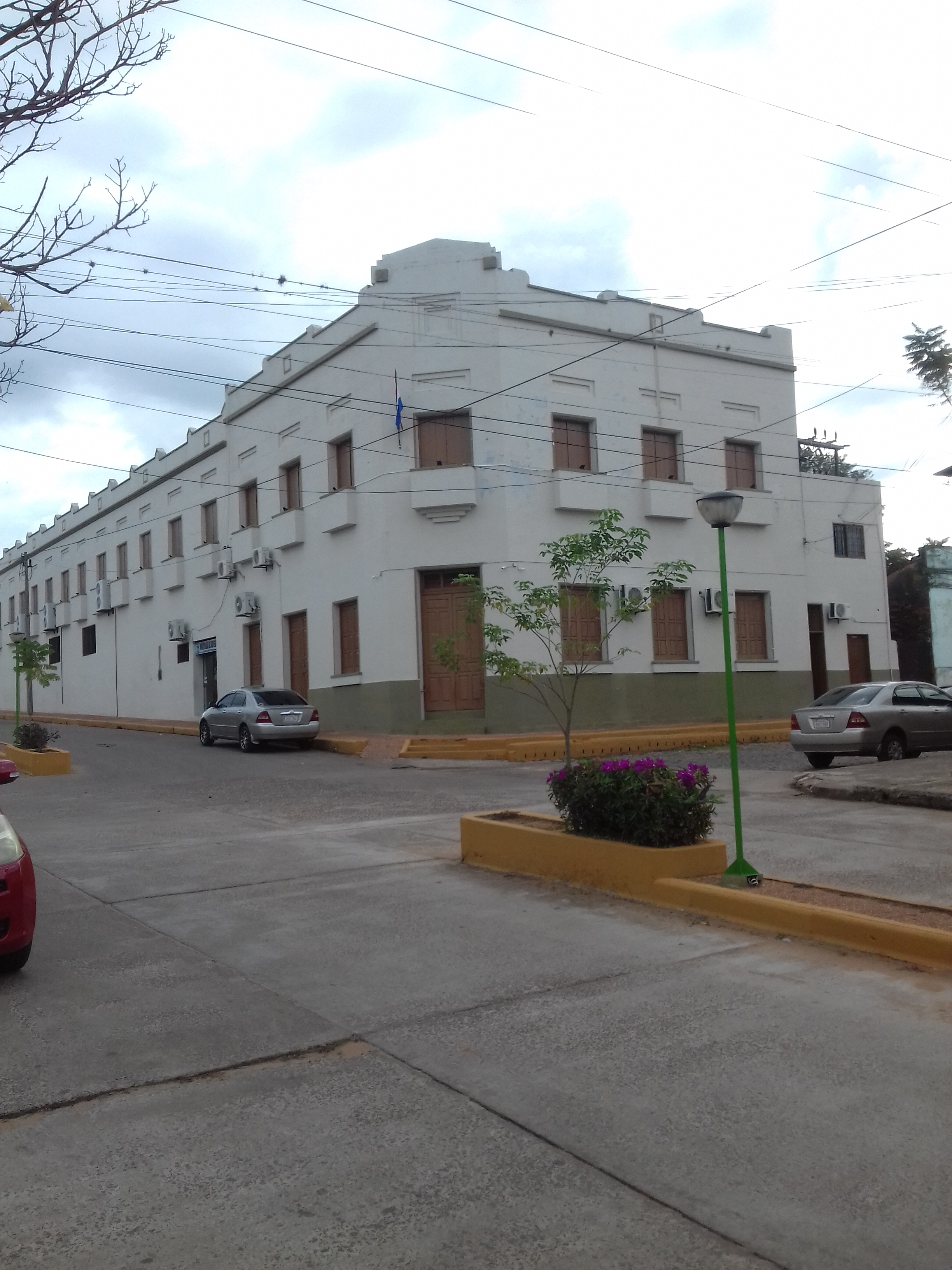 Sede de la junta municipal